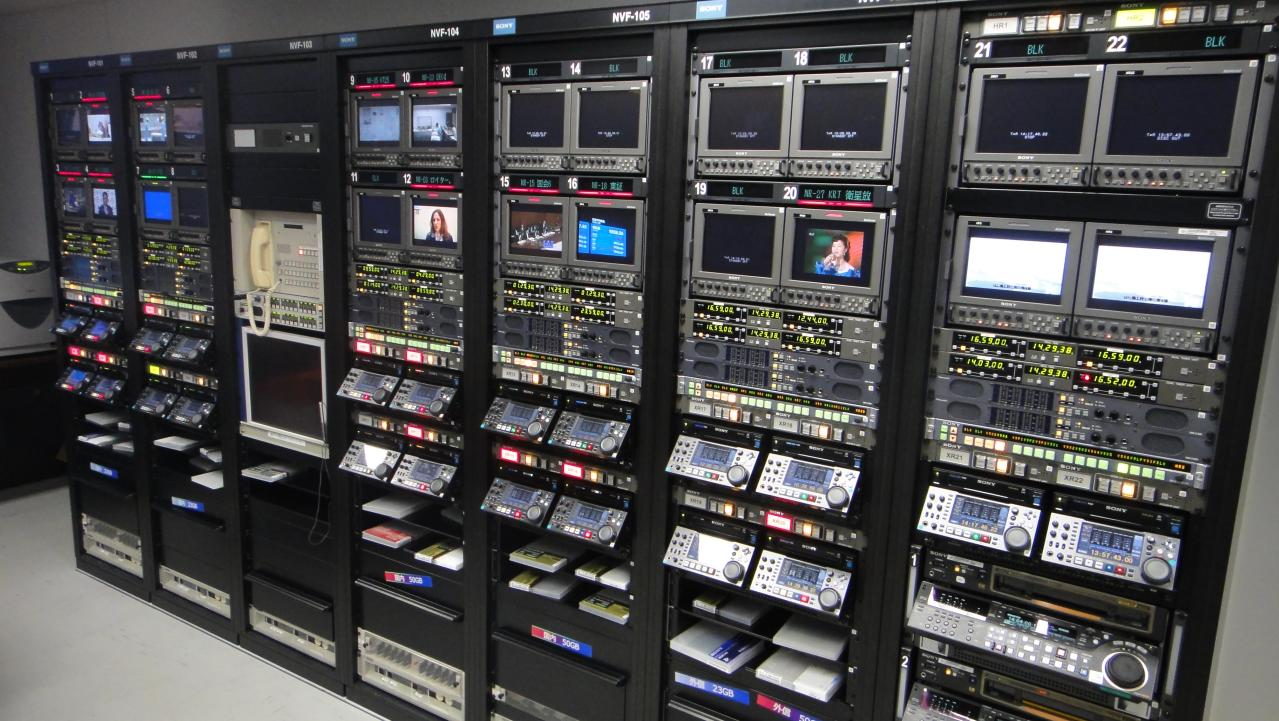 Fuji TV